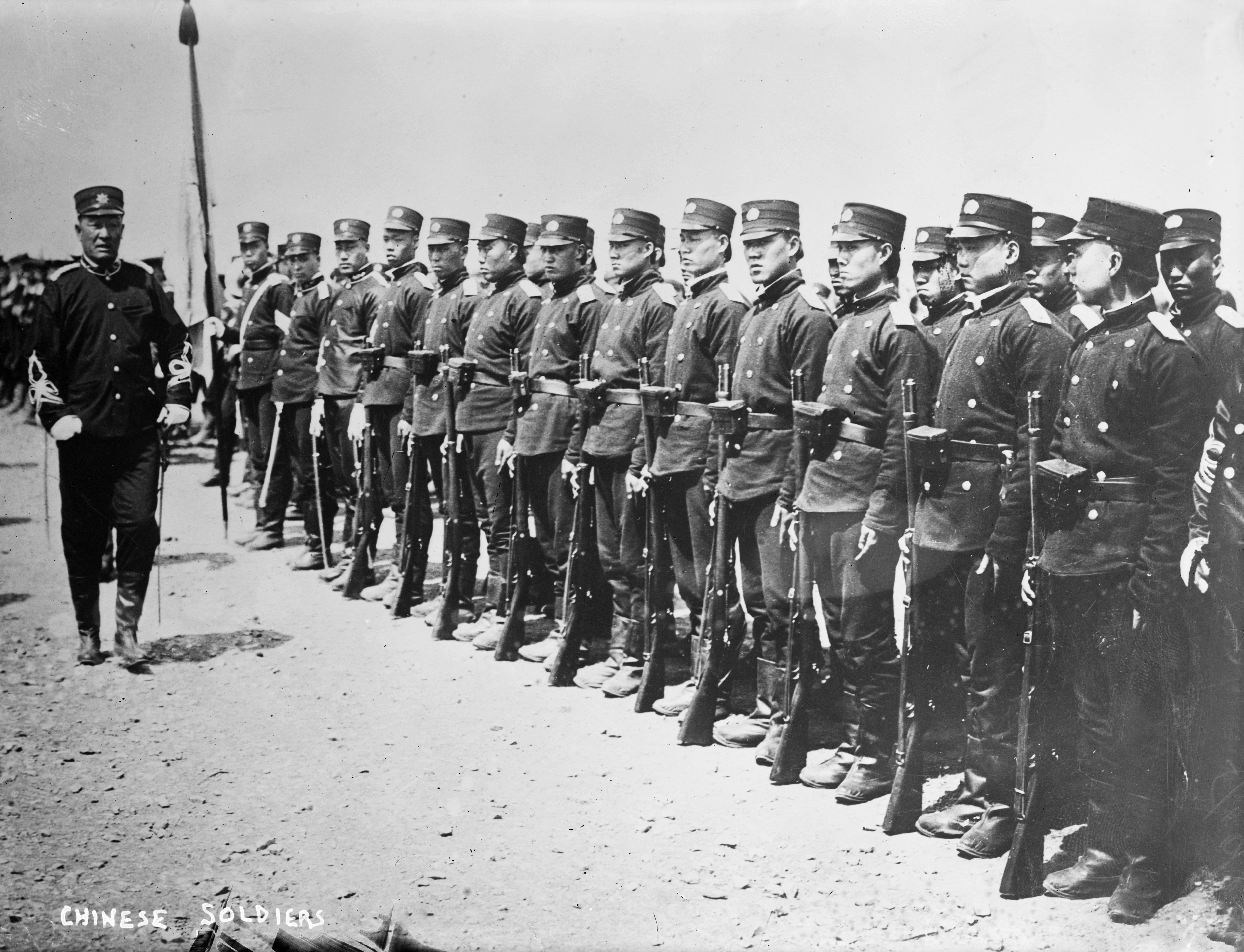 設立間もないころの新軍。